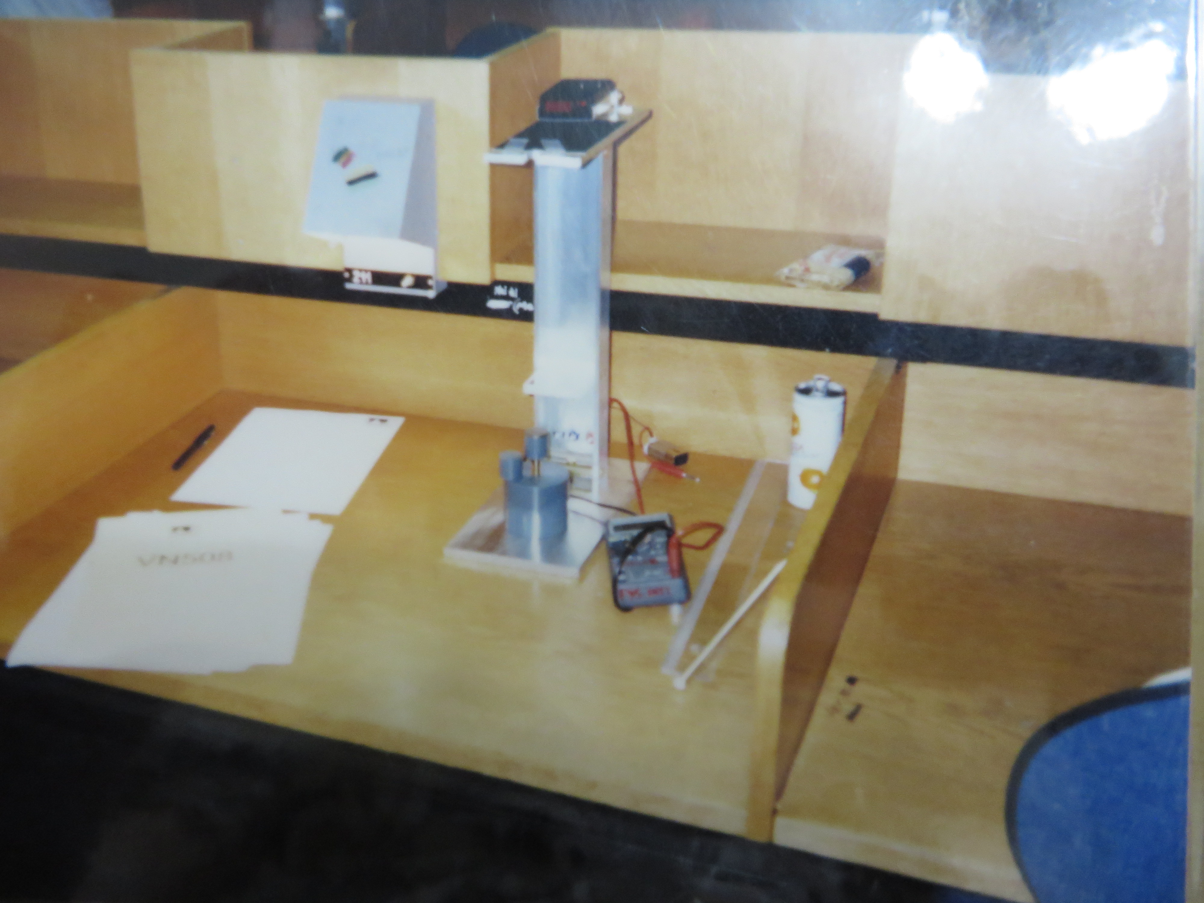 Dụng cụ cho bài thi thực nghiệm tại kỳ thi Olympic Vật lý Quốc tế 1996 tại Oslo, Na Uy. Chụp tại bàn thí sinh VN508